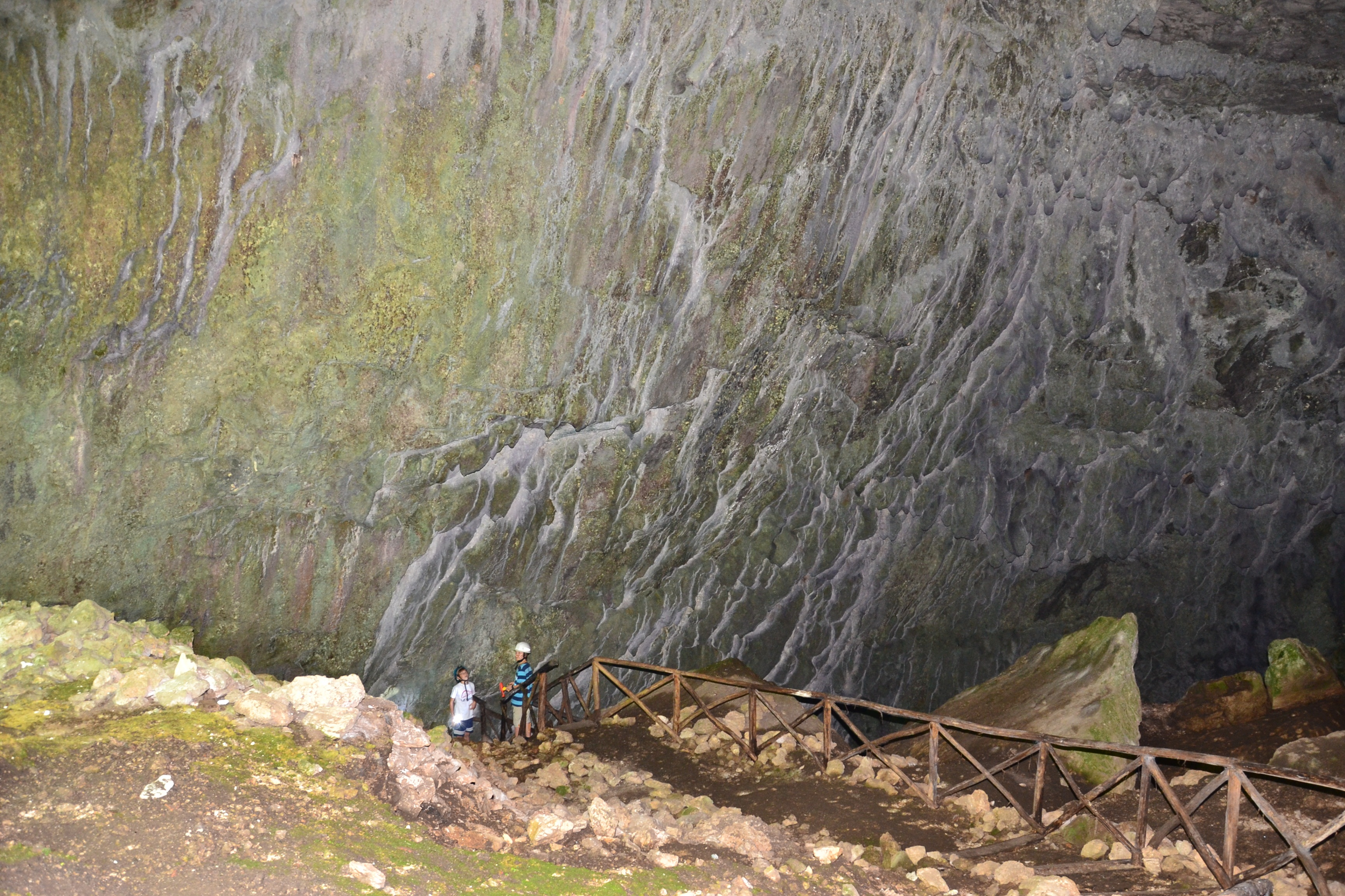 Speläologe "Vale" bei der Besichtigung "Grotta Bella" die etwa 2 km südöstlich des Dorfes Santa Restituta, in der Gemeinde Avigliano Umbro, der Provinz Terni beim Monti Amerini (Monte L'Aiola) liegt. Höhleneingang Richtung Nord-Nordwest. Kalksteinhöhle